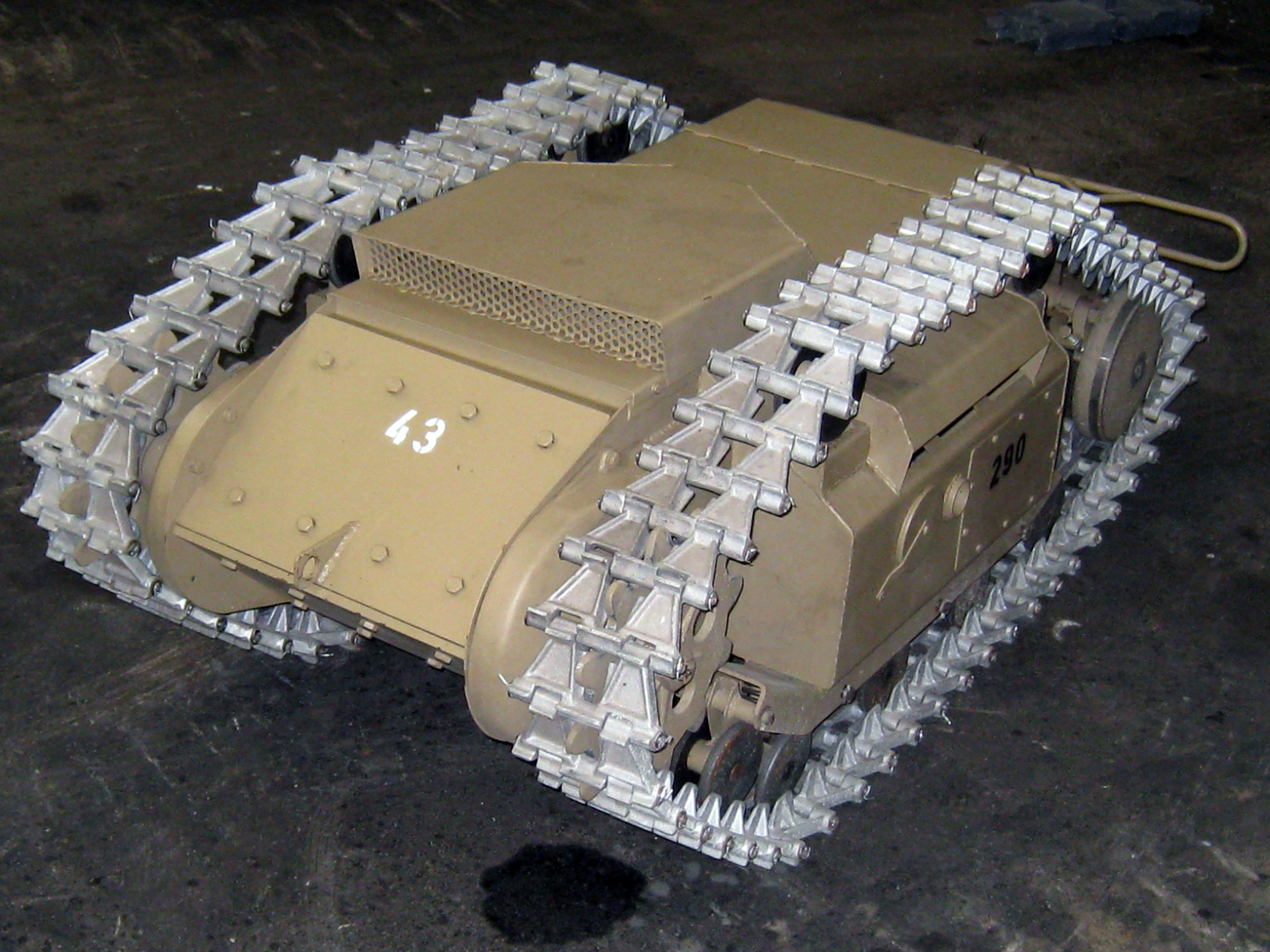 ferngesteuerter Ladungsträger Goliath der deutschen Wehrmacht